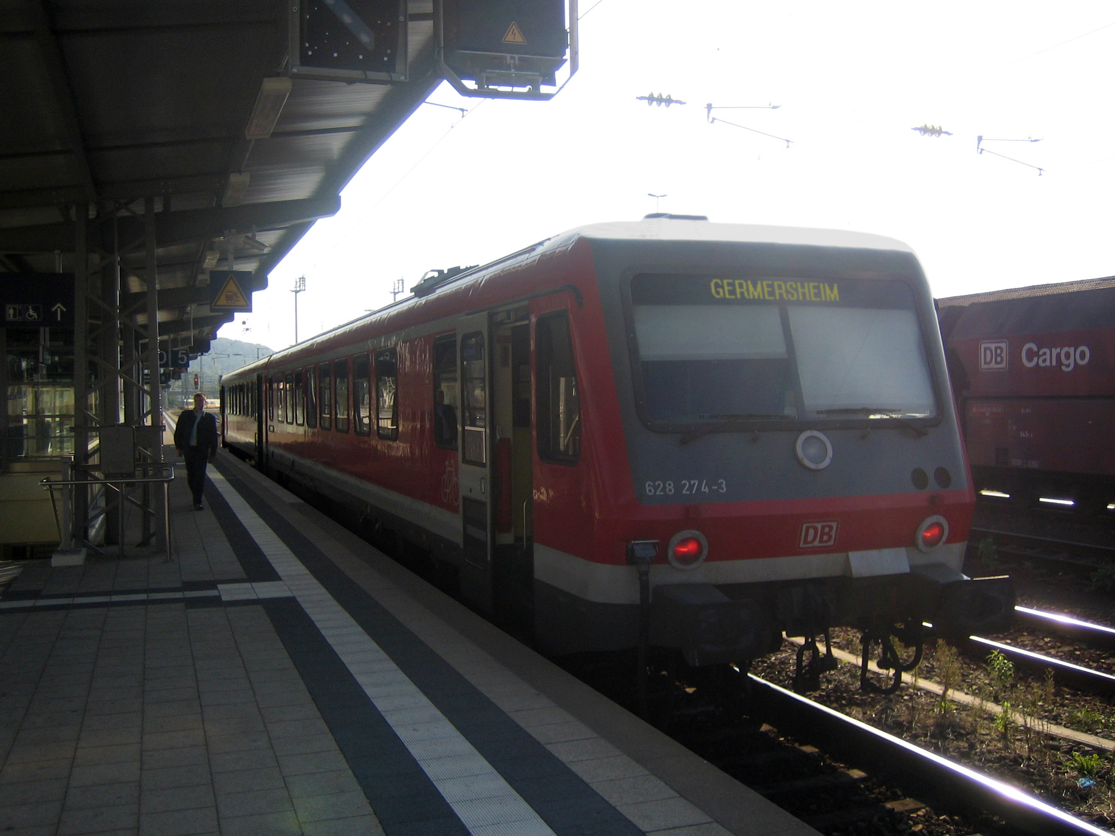 628 274-3 Zug der Bruhrainbahn im Bahnhof Bruchsal